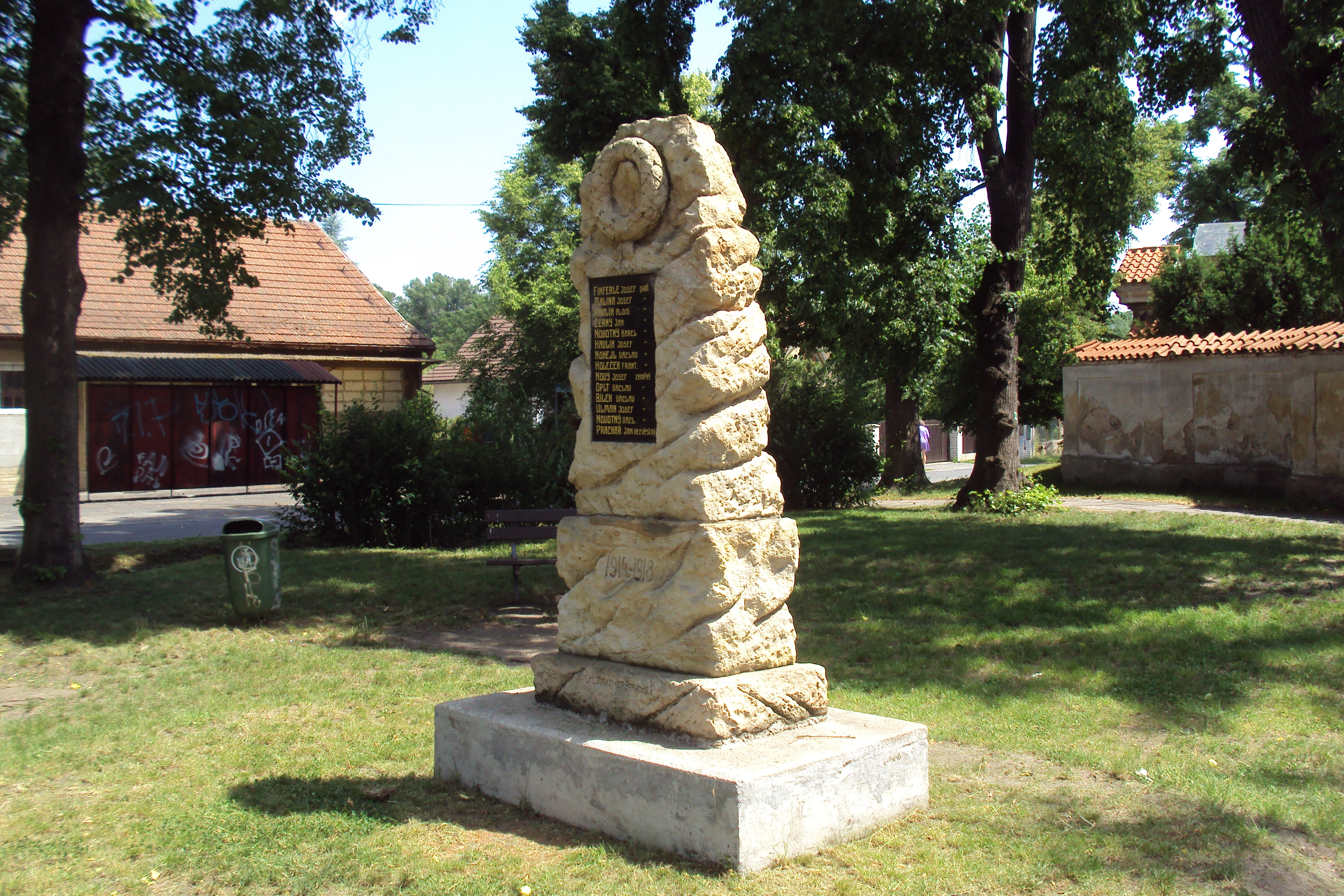 Pomník obětem I.světové války v Lobkovicích, Palackého ulice